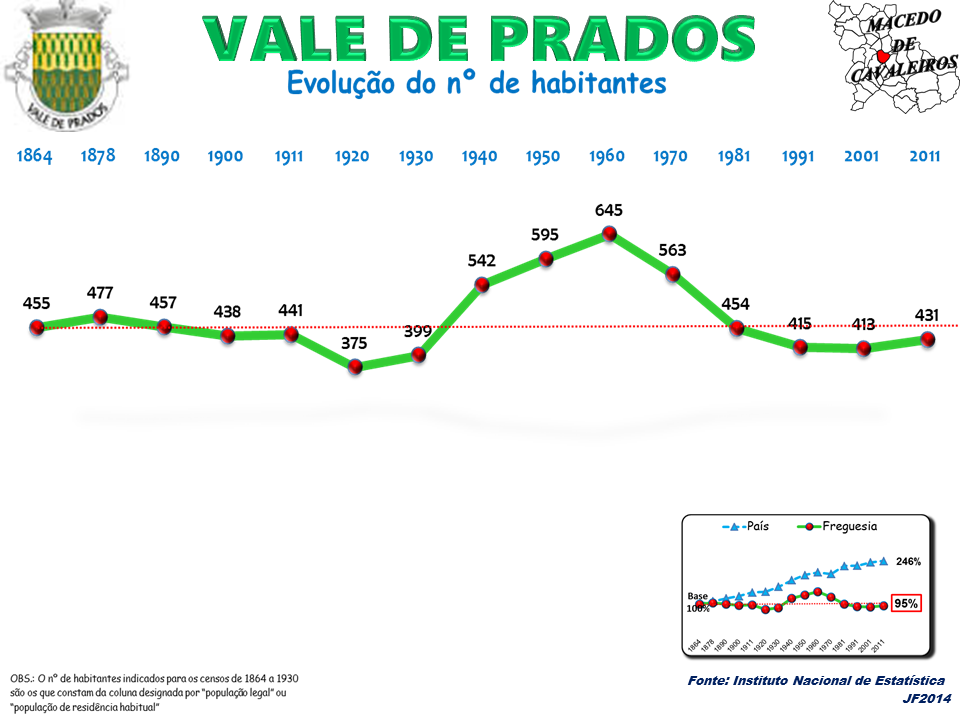 Evolução da População 1864 / 2011